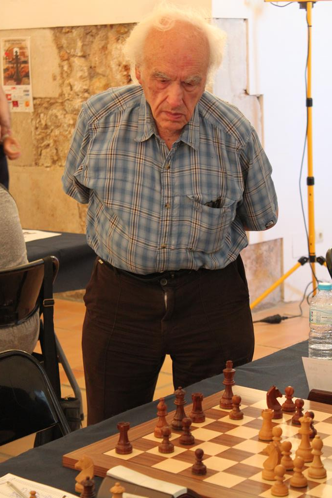 Miquel Farré i Mallofré a l'Obert Internacional de Figueres de 2016